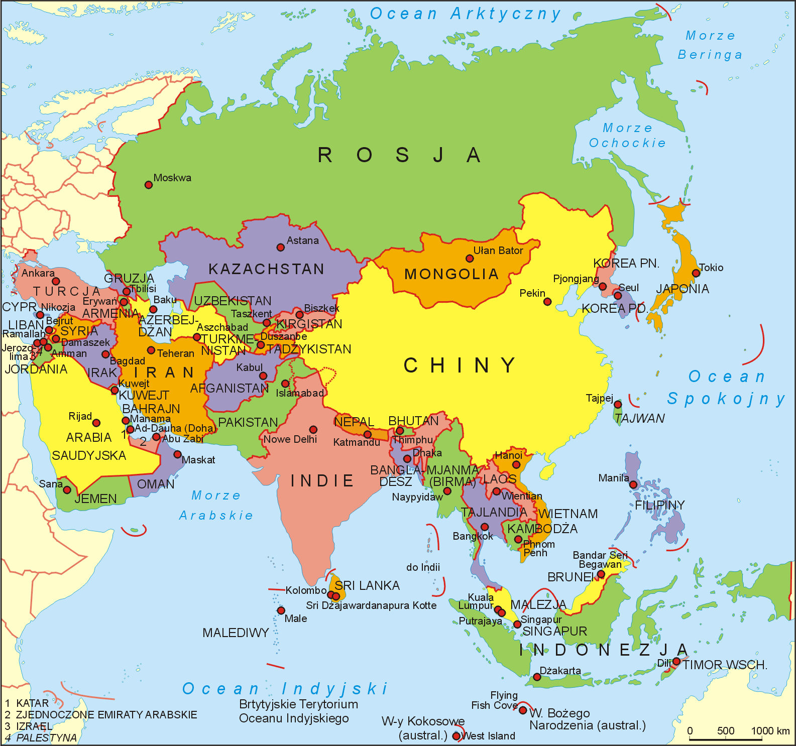 Mapa polityczna Azji. Autor: Aotearoa